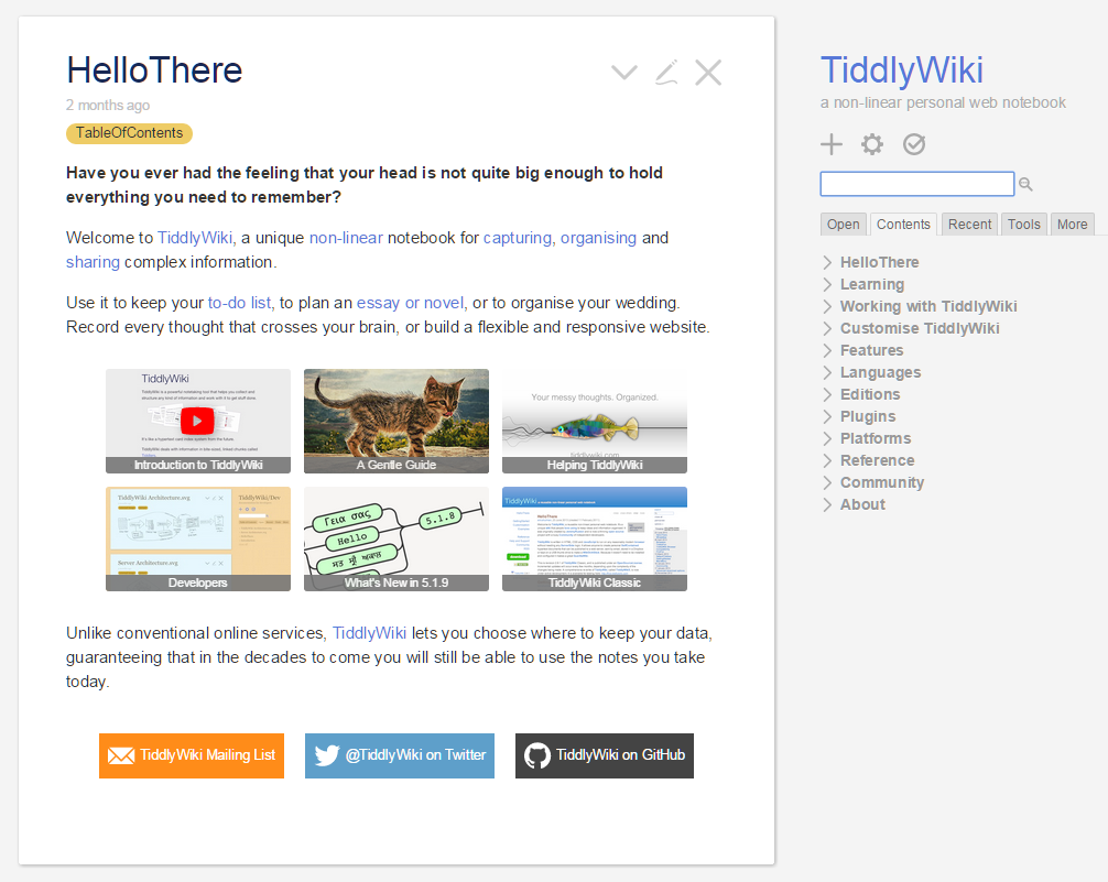 Screenshot of TiddlyWiki 5.1.9